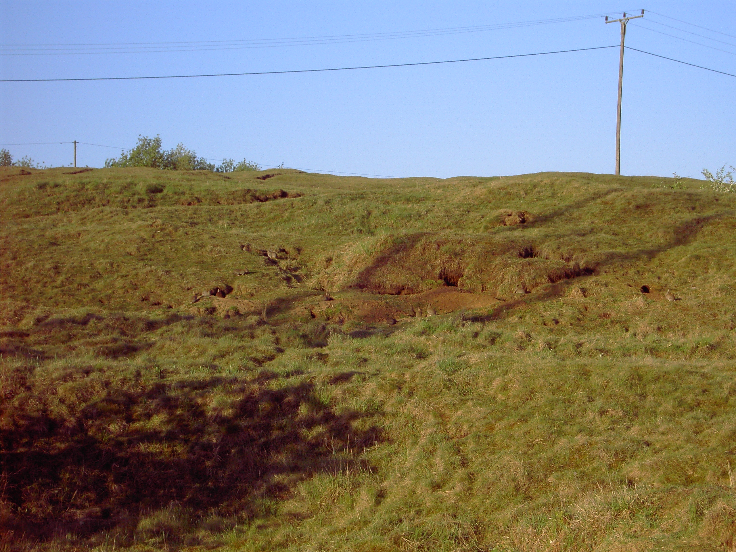 Pingenlandschaft im Naturschutzgebiet Brockenberg